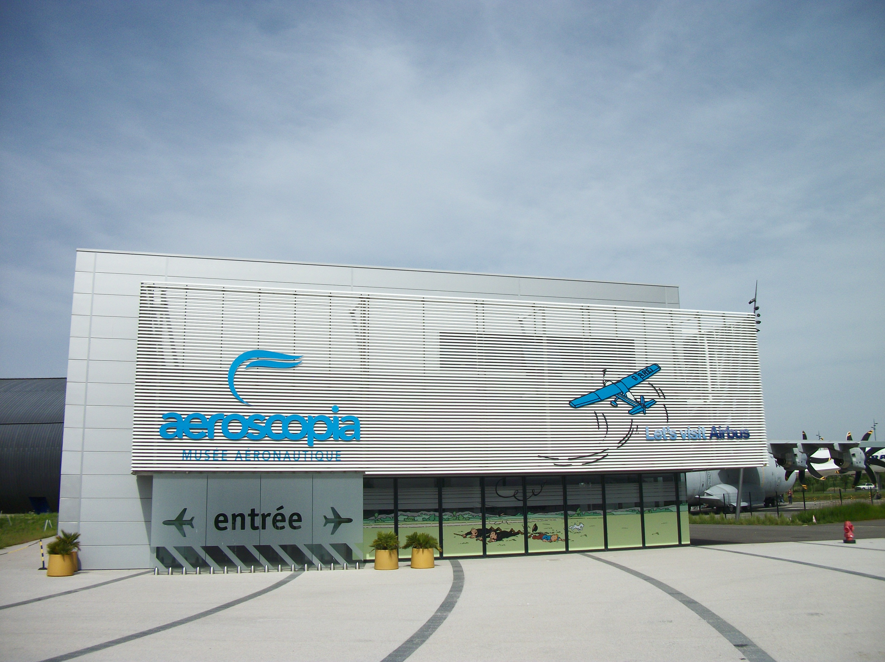 Aeroscopia est un musée aéronautique français implanté à Blagnac (Haute-Garonne), près du site AéroConstellation